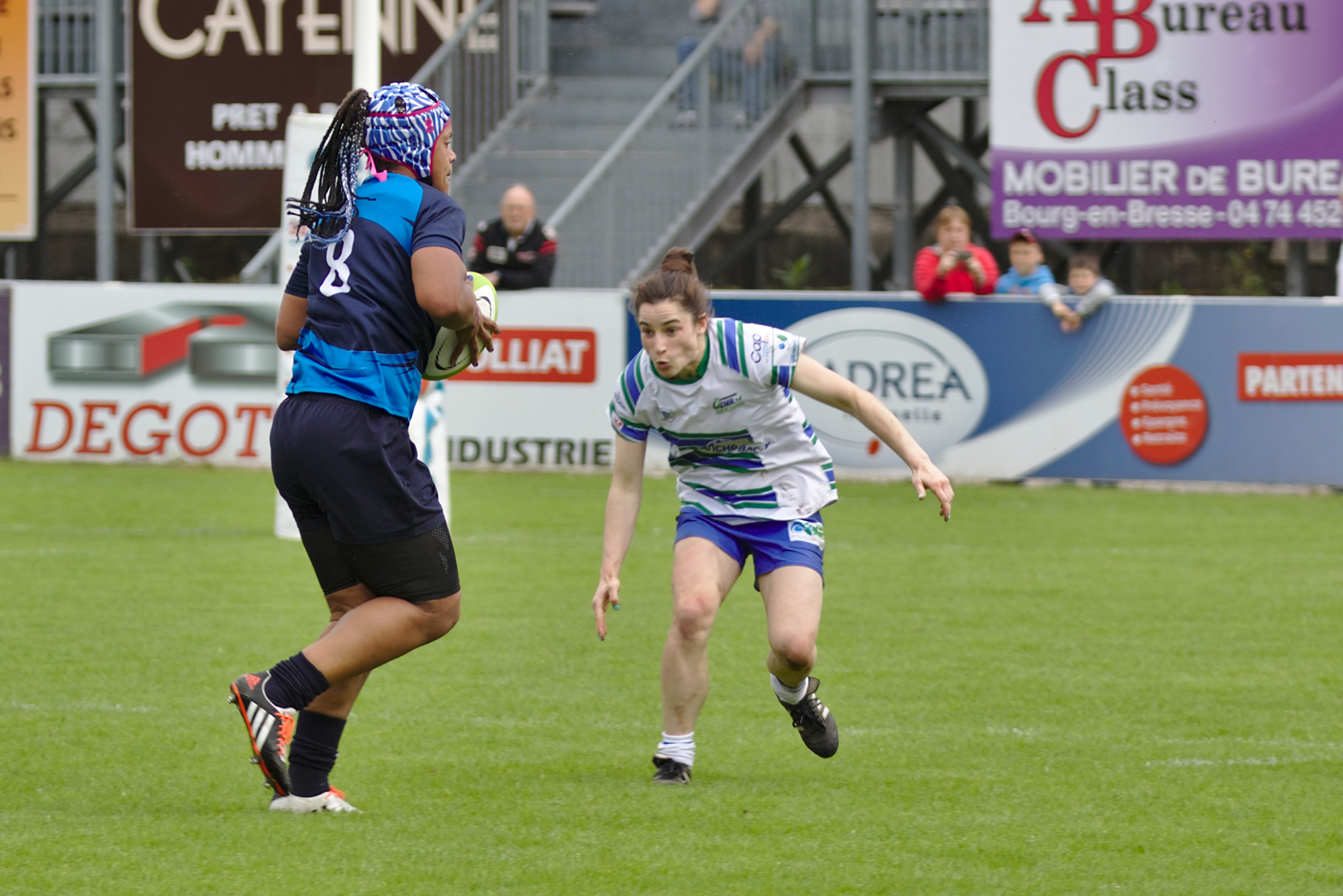 Finale Top 8 2015 - MHR vs LMRCV - 20150502